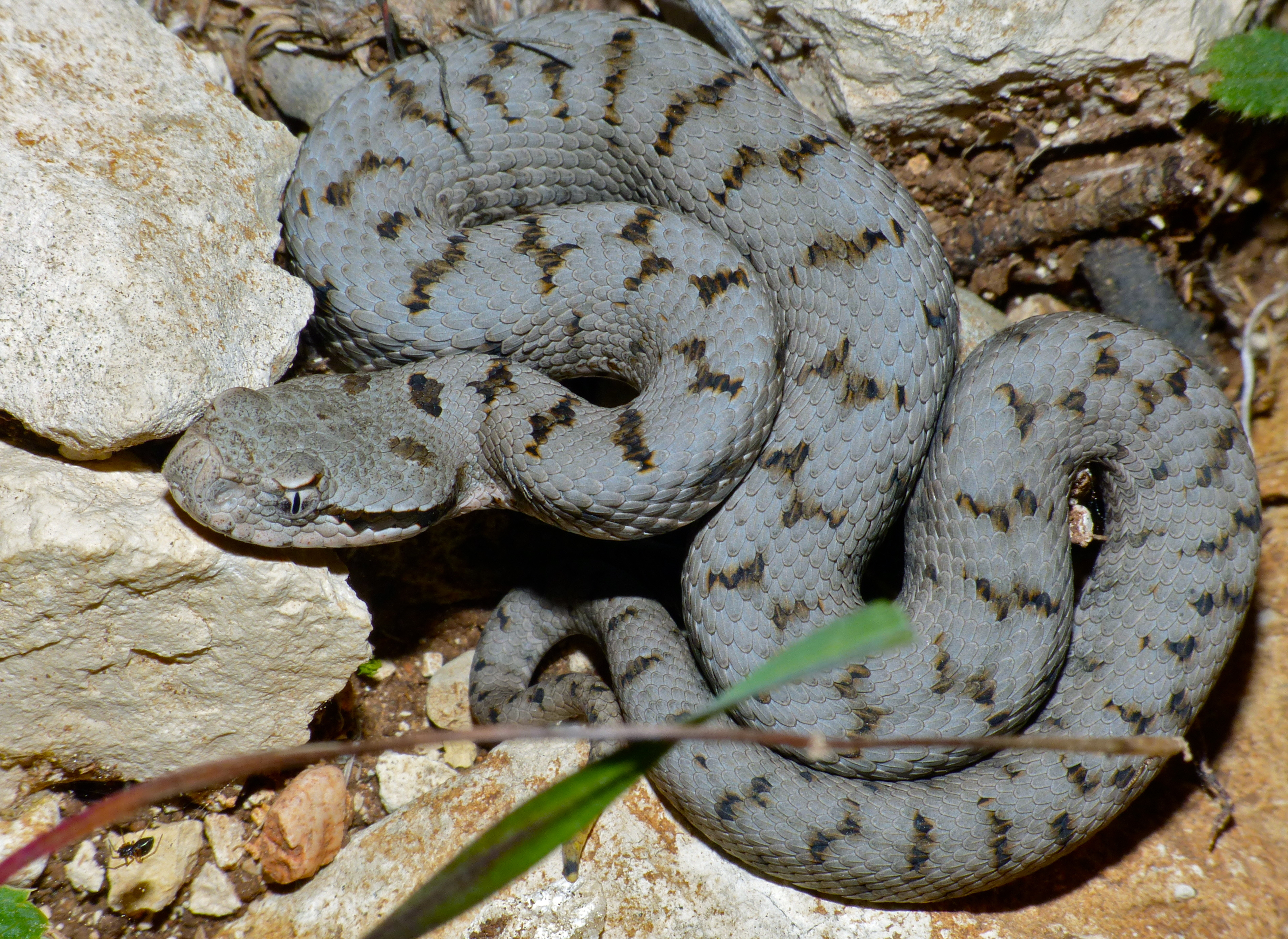 Valcrose, Aniane, Hérault, FRANCE